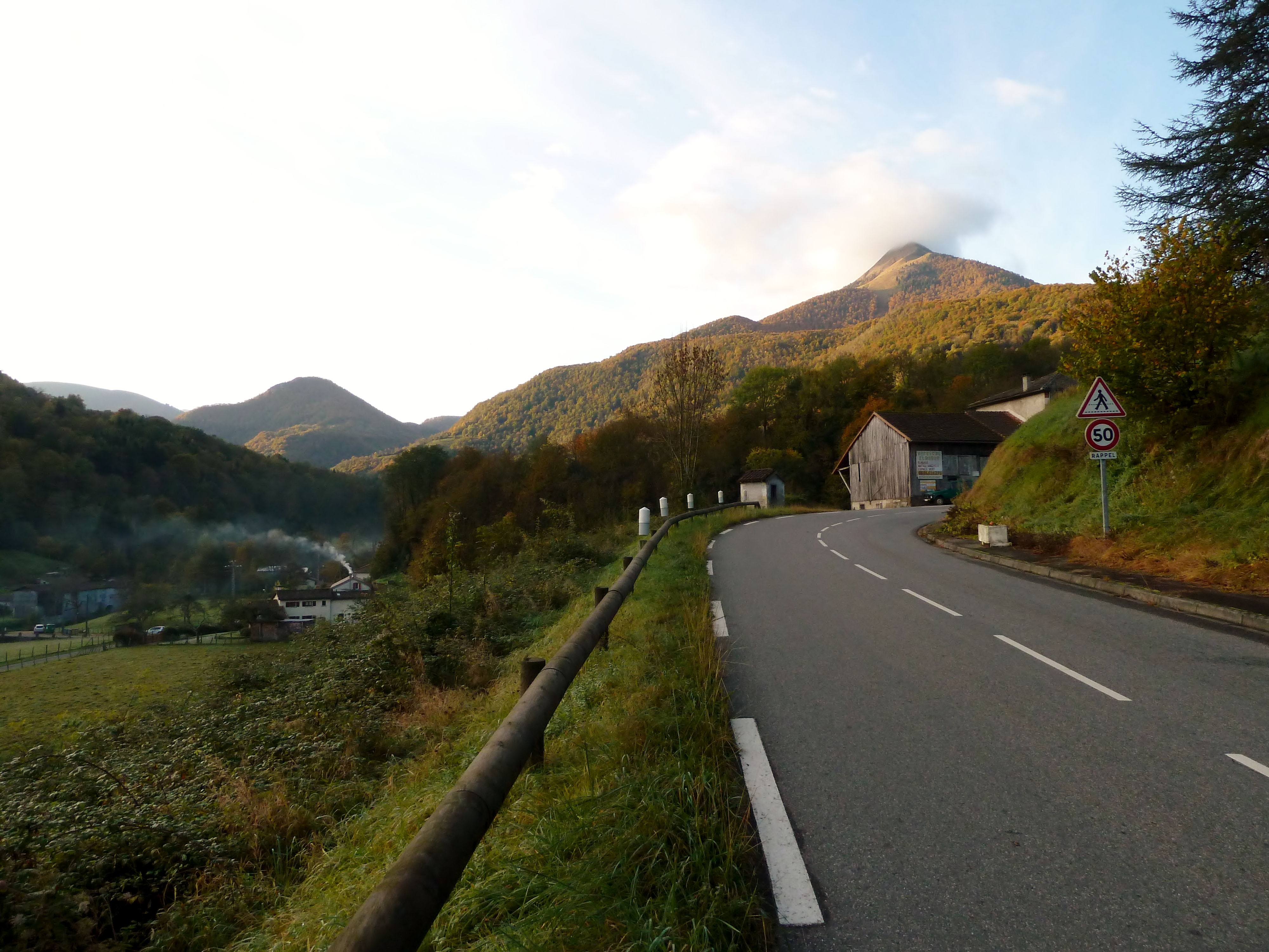 Sengouagnet